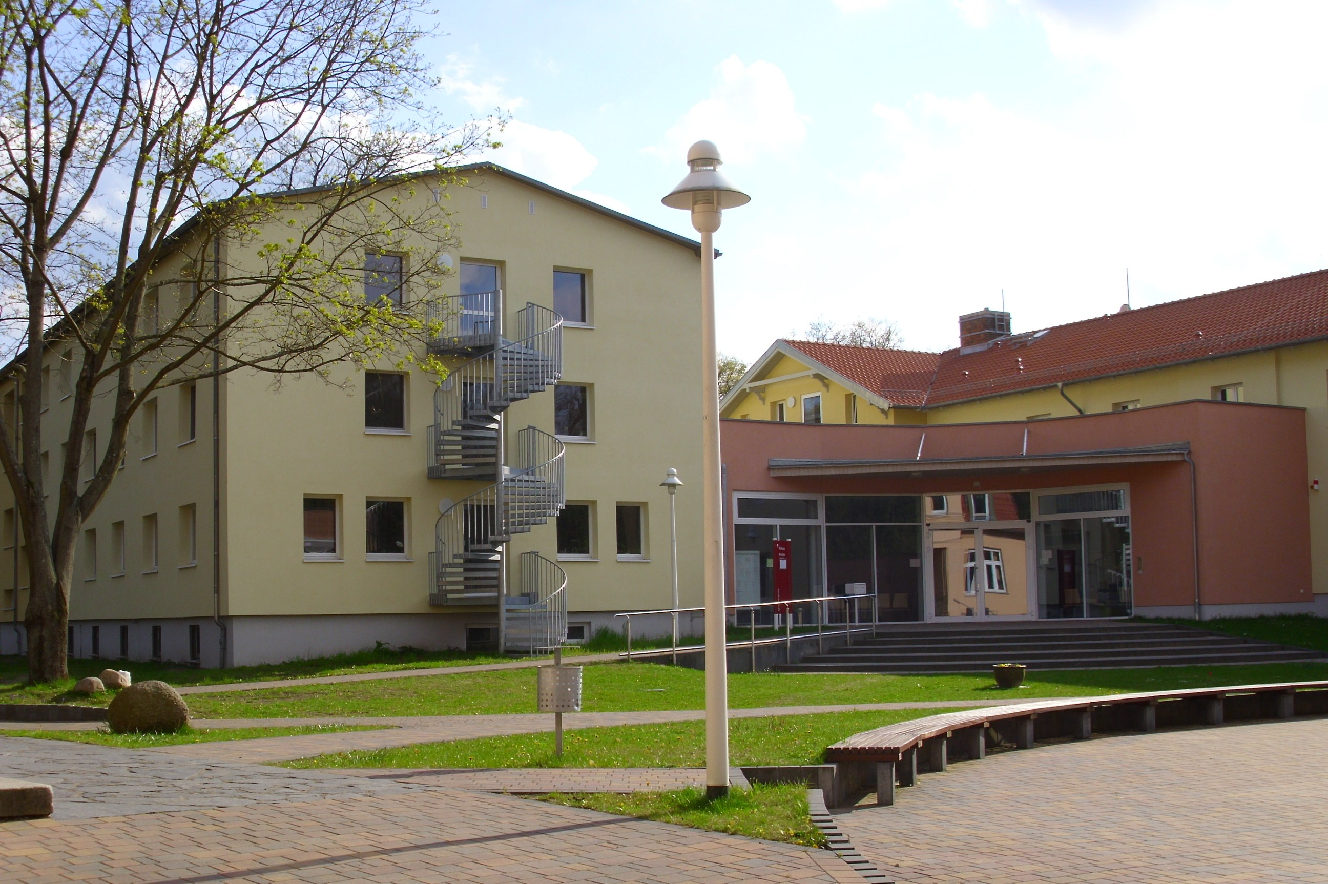 Rathaus in Lindenallee Hoppegarten